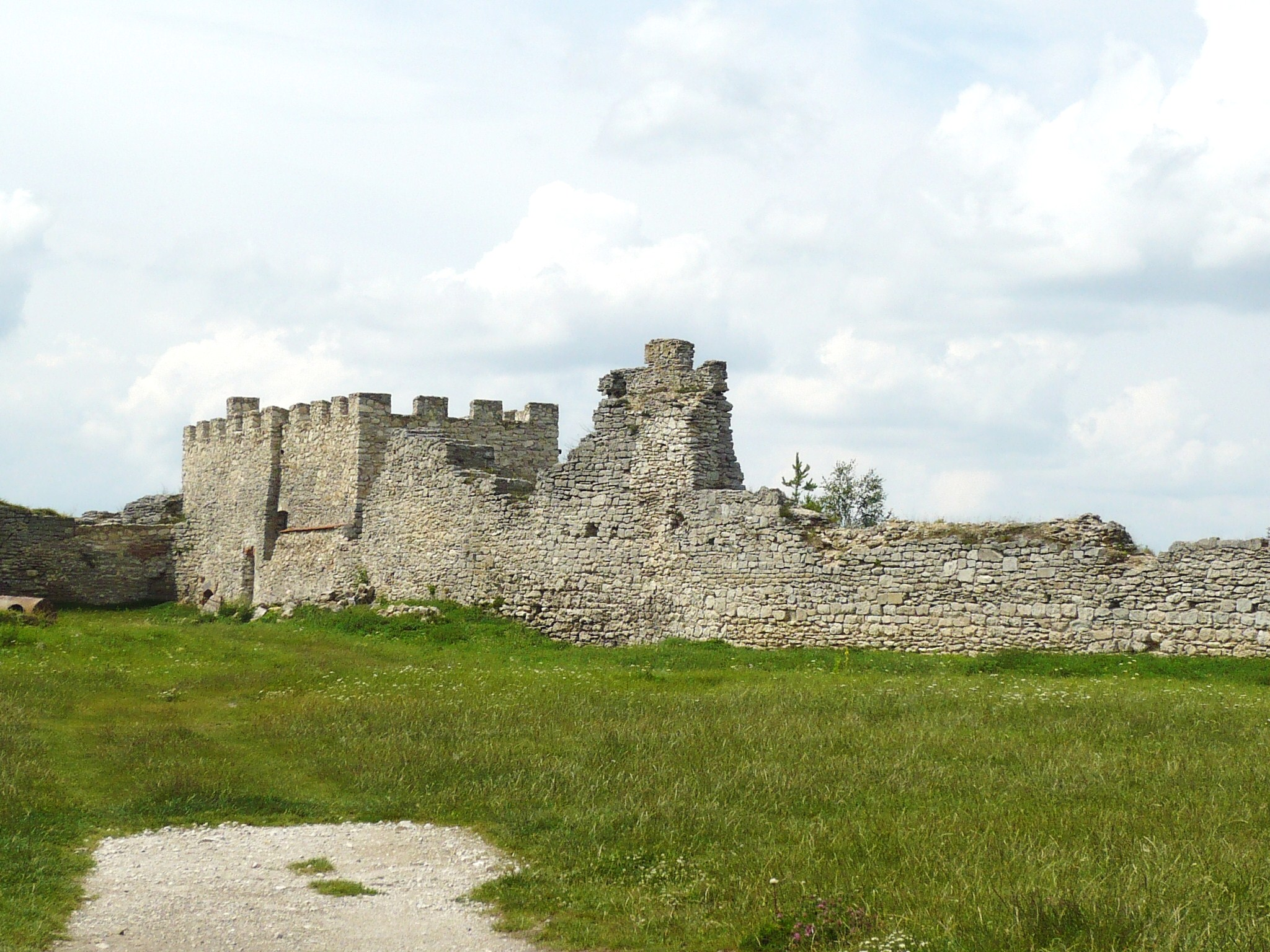 Zamek w Krzemieńcu